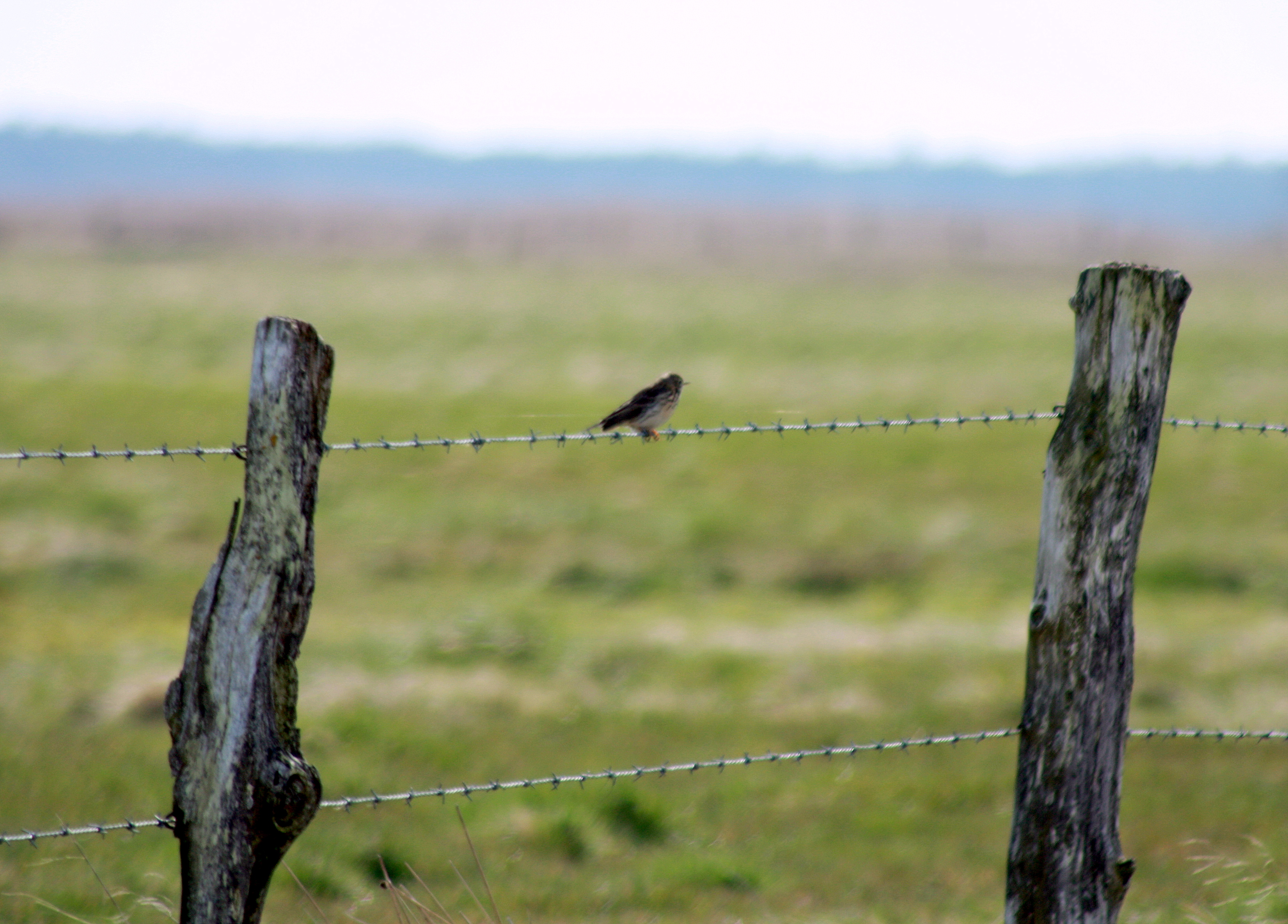 6830 Norre Nebel, Denmark